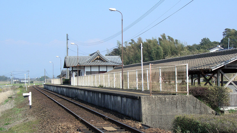 くま川鉄道湯前線ja:おかどめ幸福駅 ホーム 写真手前がja:人吉駅方面。 撮影者/著者/著作権保有者 : MK Products (本人がアップロード) 撮影日 : 2007/03/22 おかどめ幸福駅用にアップロードした画像です。良い画像があれば別の画像に変えてください。